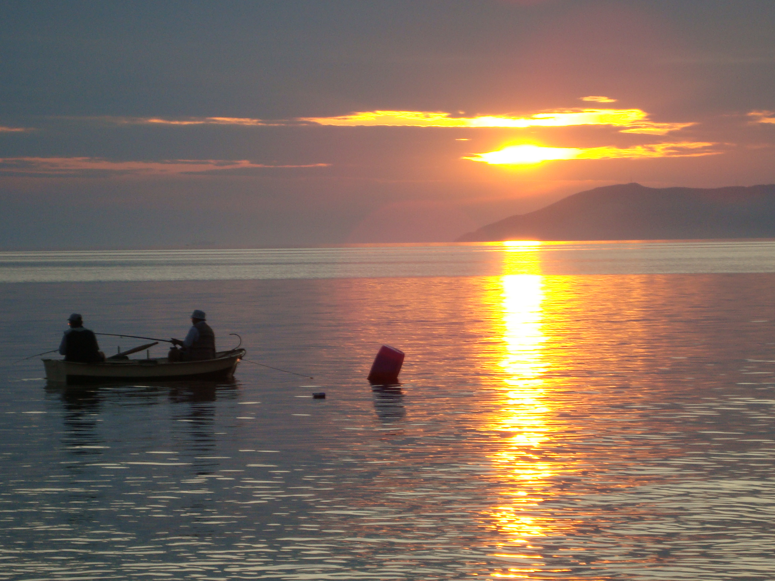 bursa ,kumla